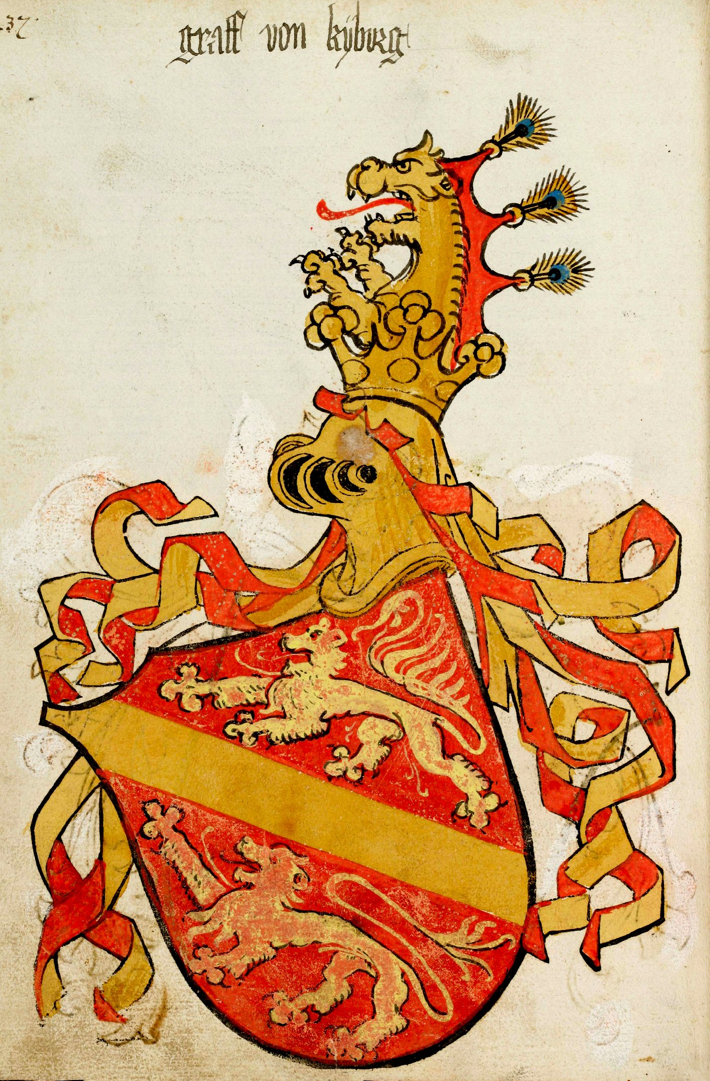 Graf von Kyburg im Wappenbuch des St. Galler Abtes Ulrich Rösch; Stiftsbibliothek St. Gallen, Cod. sang. 1084